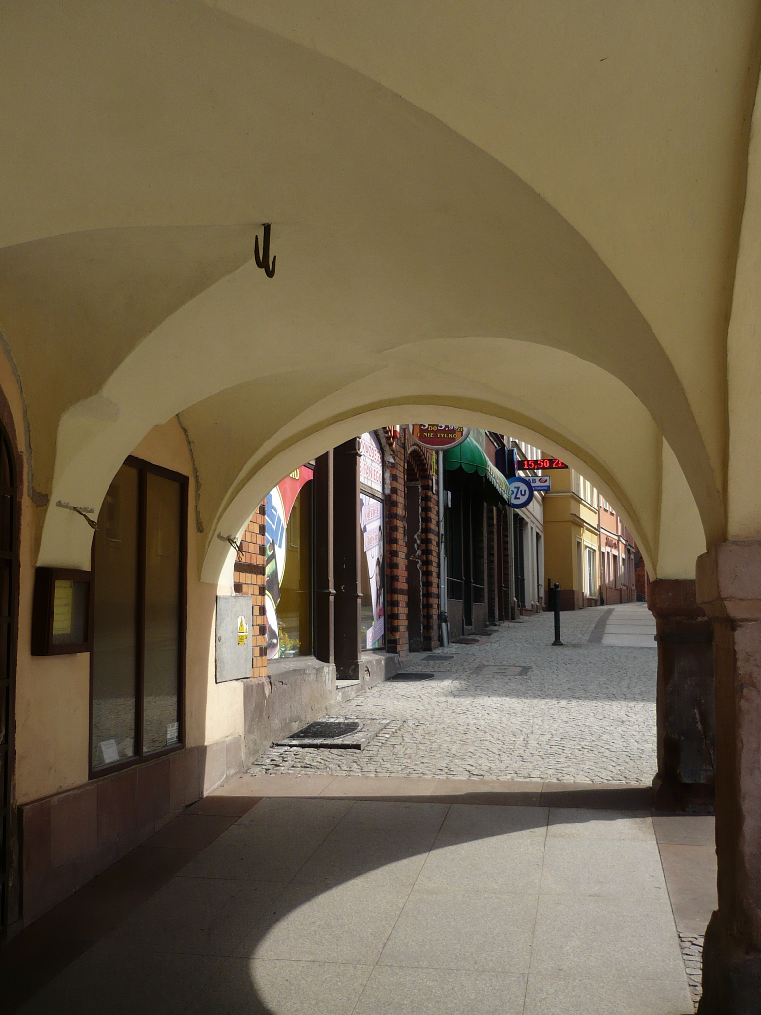 Nowa Ruda, Rynek 7 - podcienie kamienicy, XVI/XVII, XVIII, 1884 (zabytek nr A/1176 z 31.03.2009)